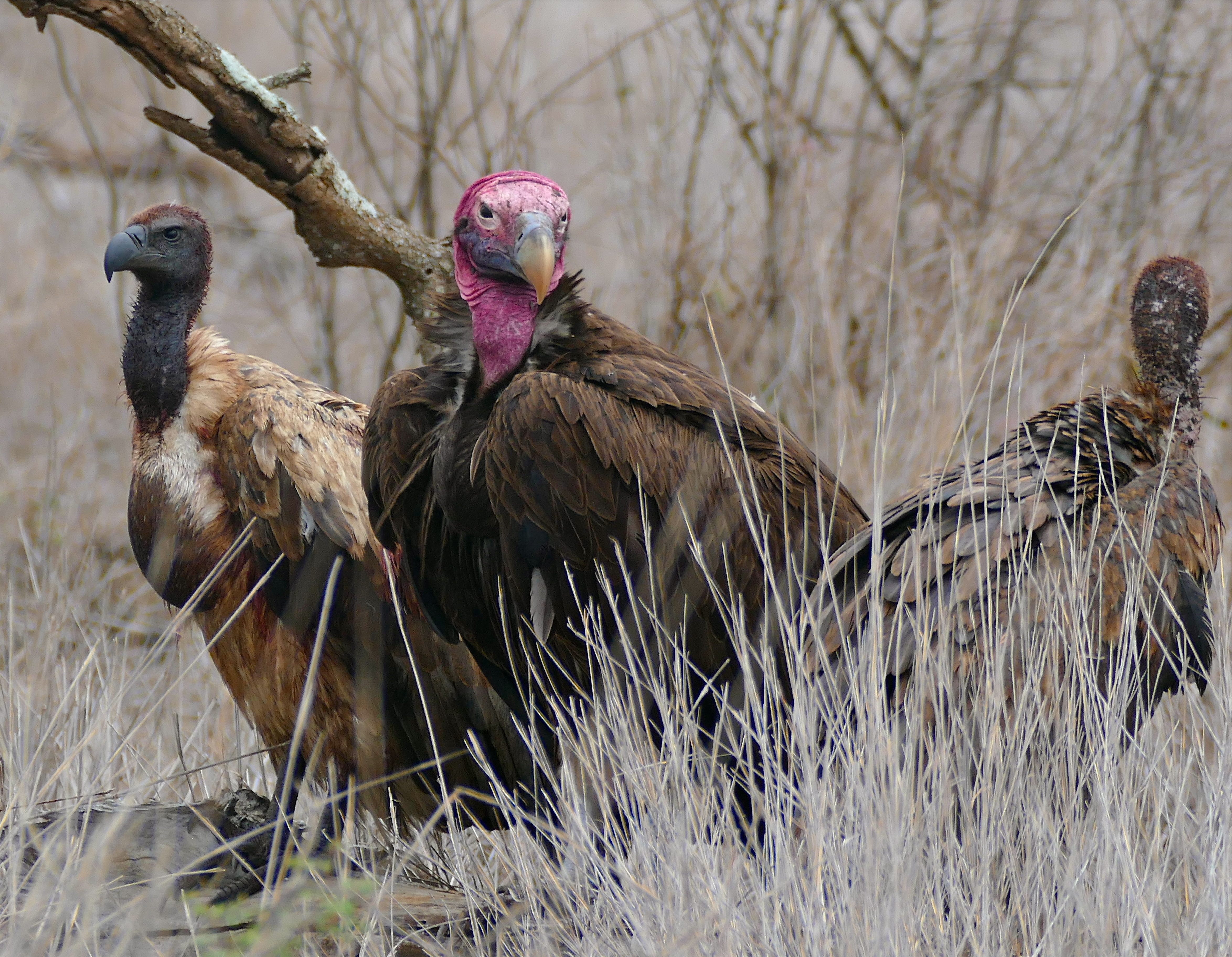 S100 Road East of Satara, Kruger NP, Mpumalanga, SOUTH AFRICA